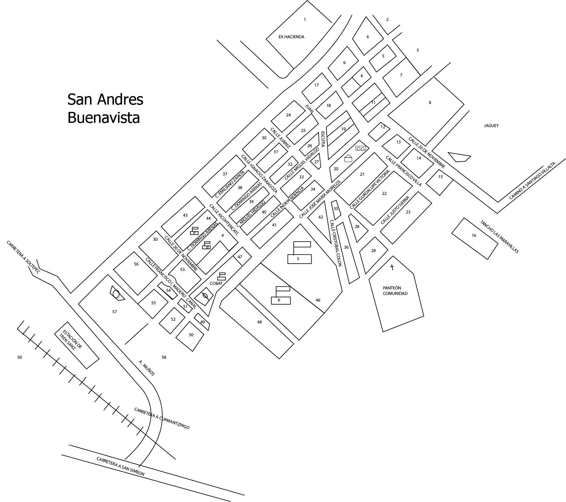 Aqui se puede apreciar la conformacion de Buenavista